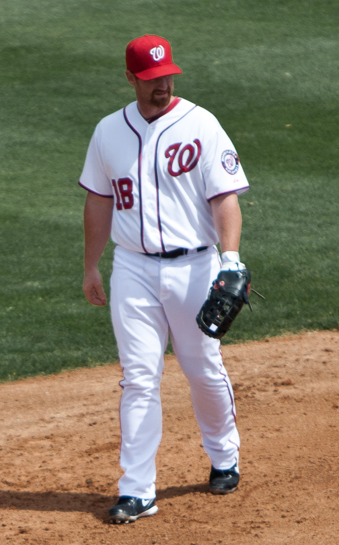 Chad Tracy